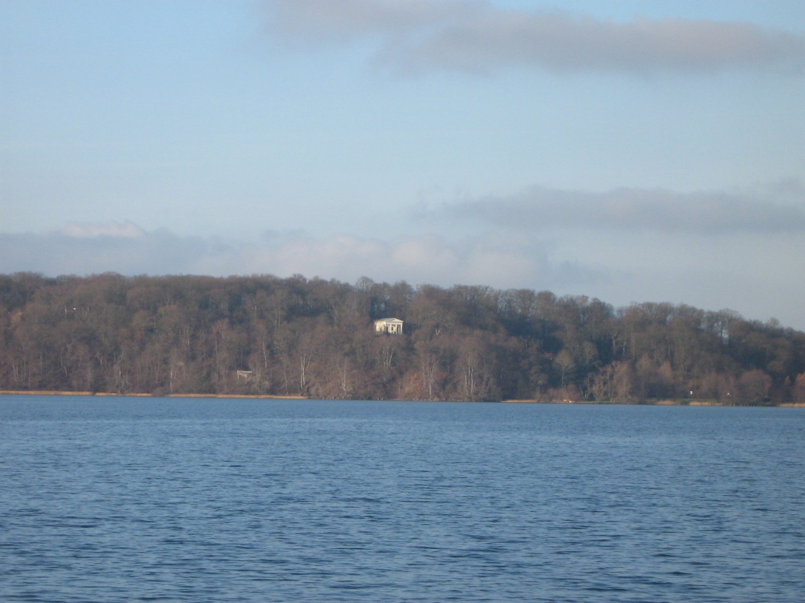 Blick über den Tollensesee aufs Belvedere im Brodaer Holz bei Neubrandenburg (Mecklenburg).